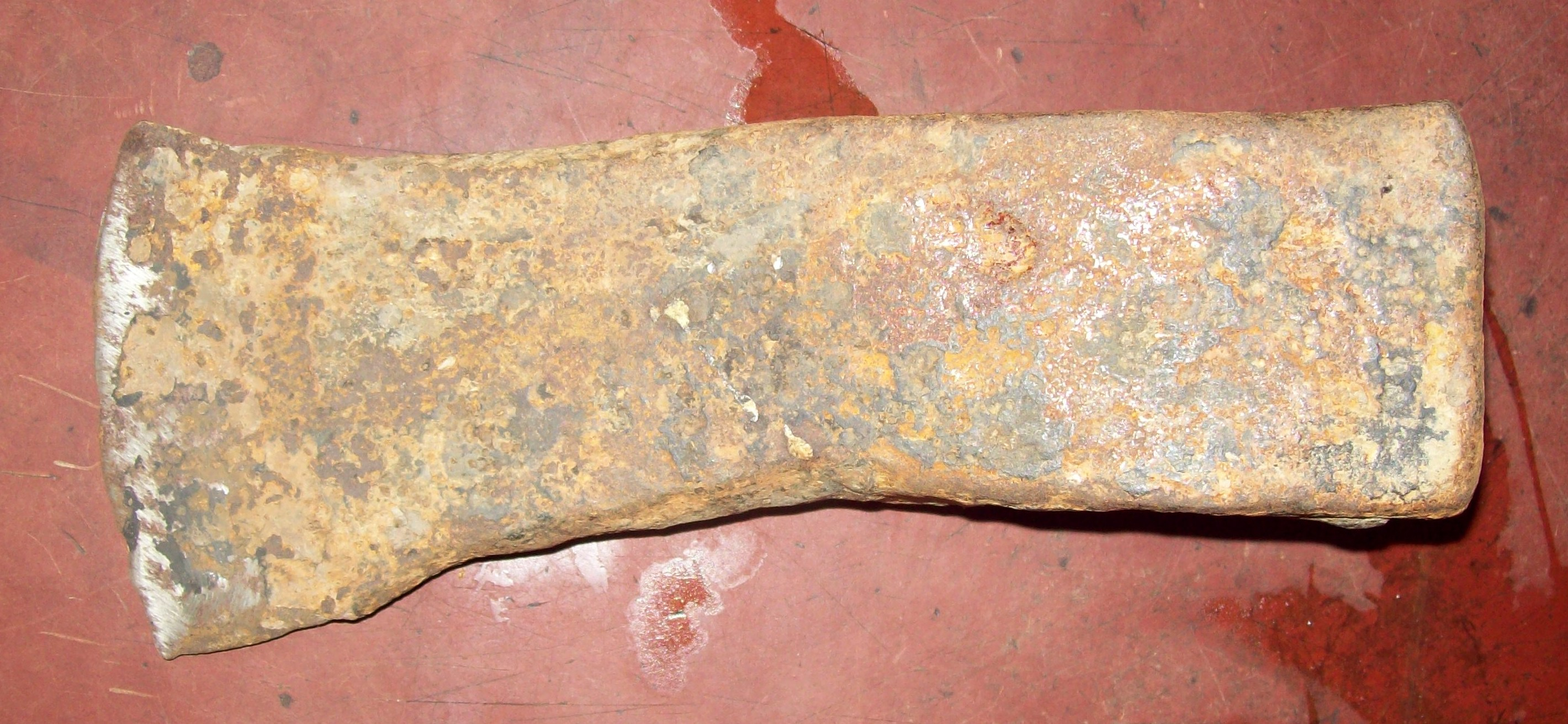 Бойова сокира (колун) віднайдена в українських Карпатах, зброя готів